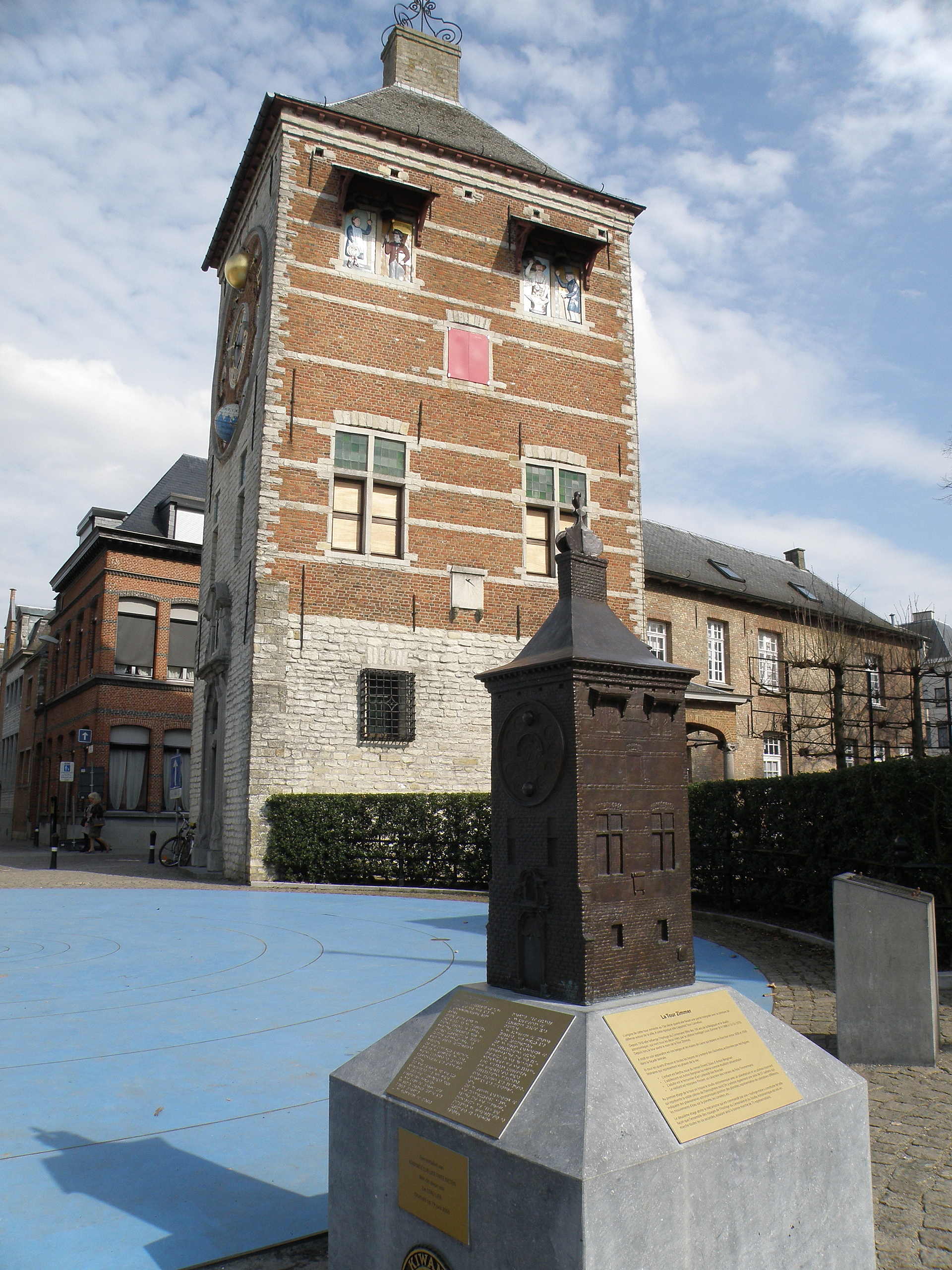 Lier (België). Zimmertoren.